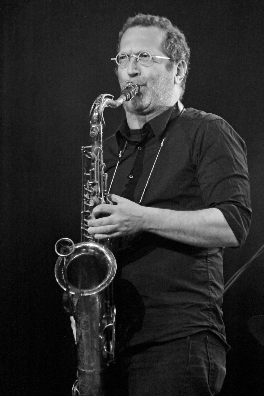 David Klein beim St. Ingberter Jazzfestival 2017